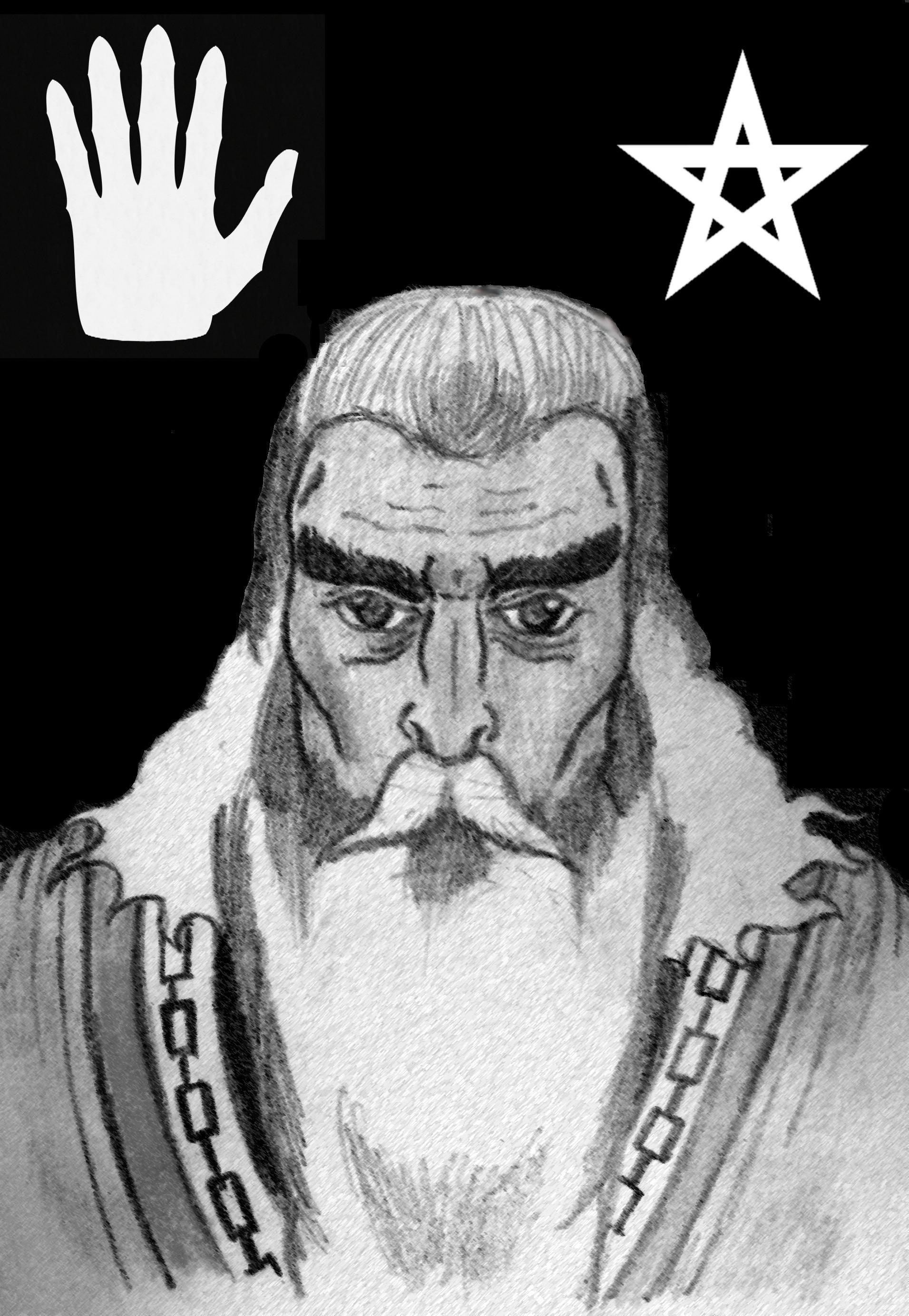 Curunír o Saruman.